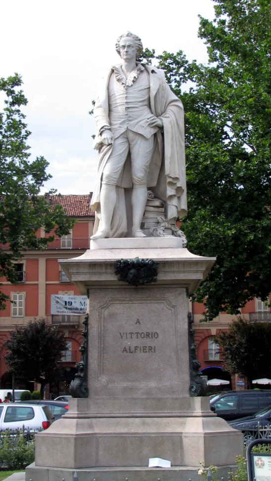 Giuseppe Dini (1820-1890), Monumento a Vittorio Alfieri, Asti (1862).